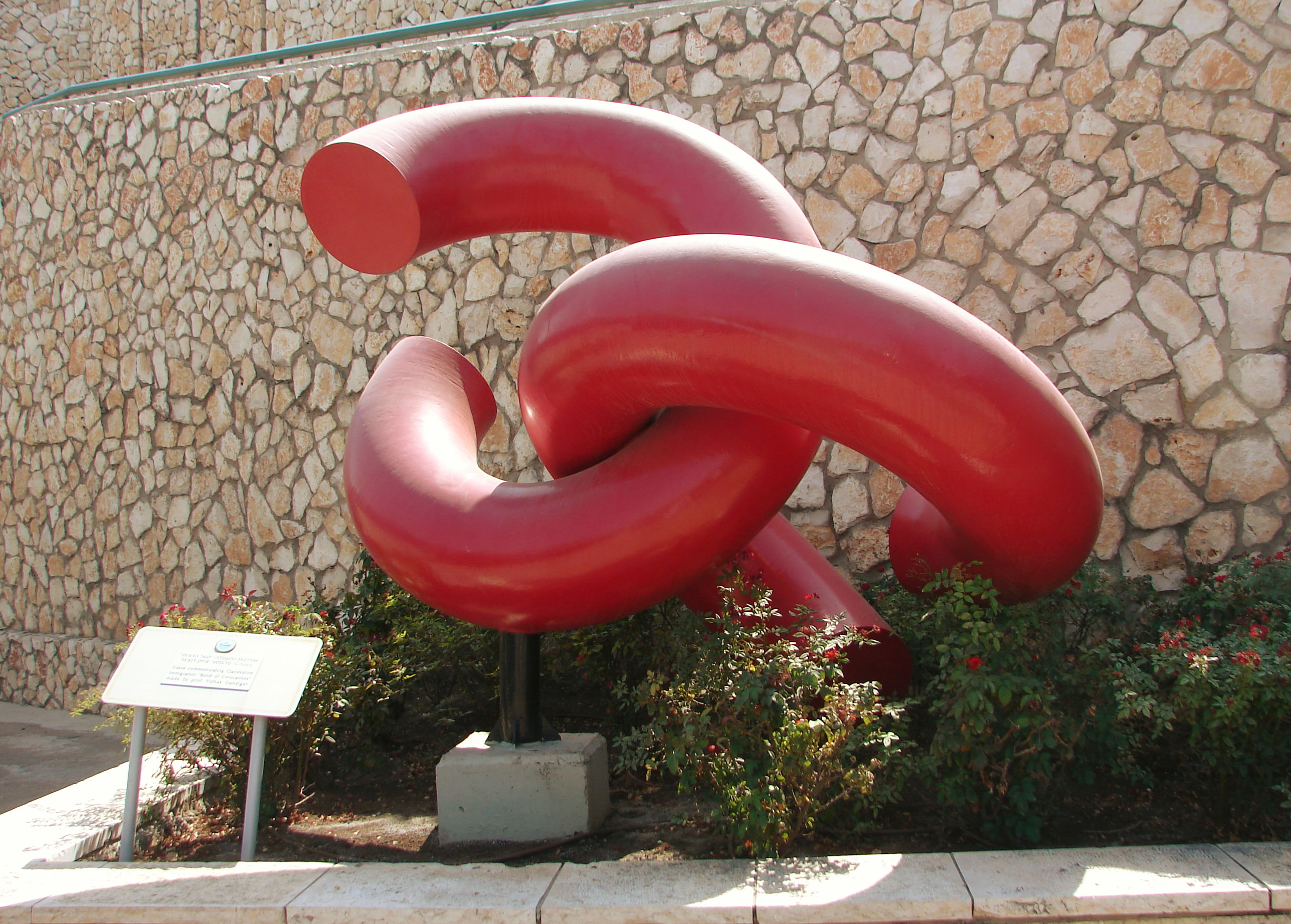 Sculpture